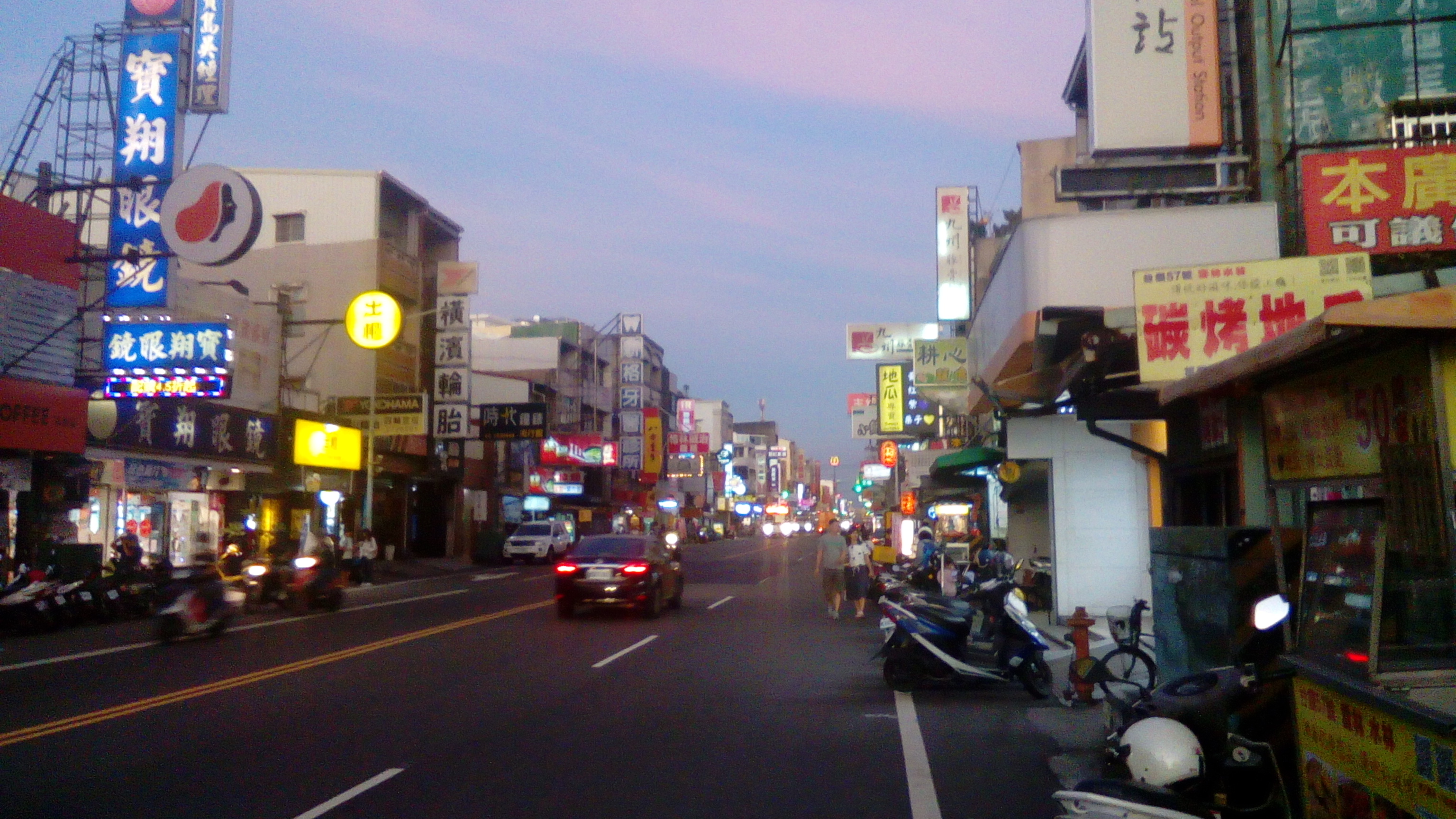 位於永康區崑山里 180縣道上